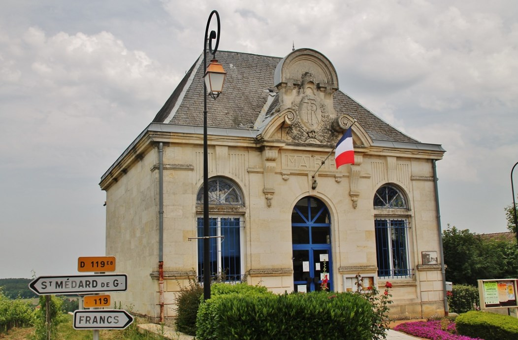 La Mairie